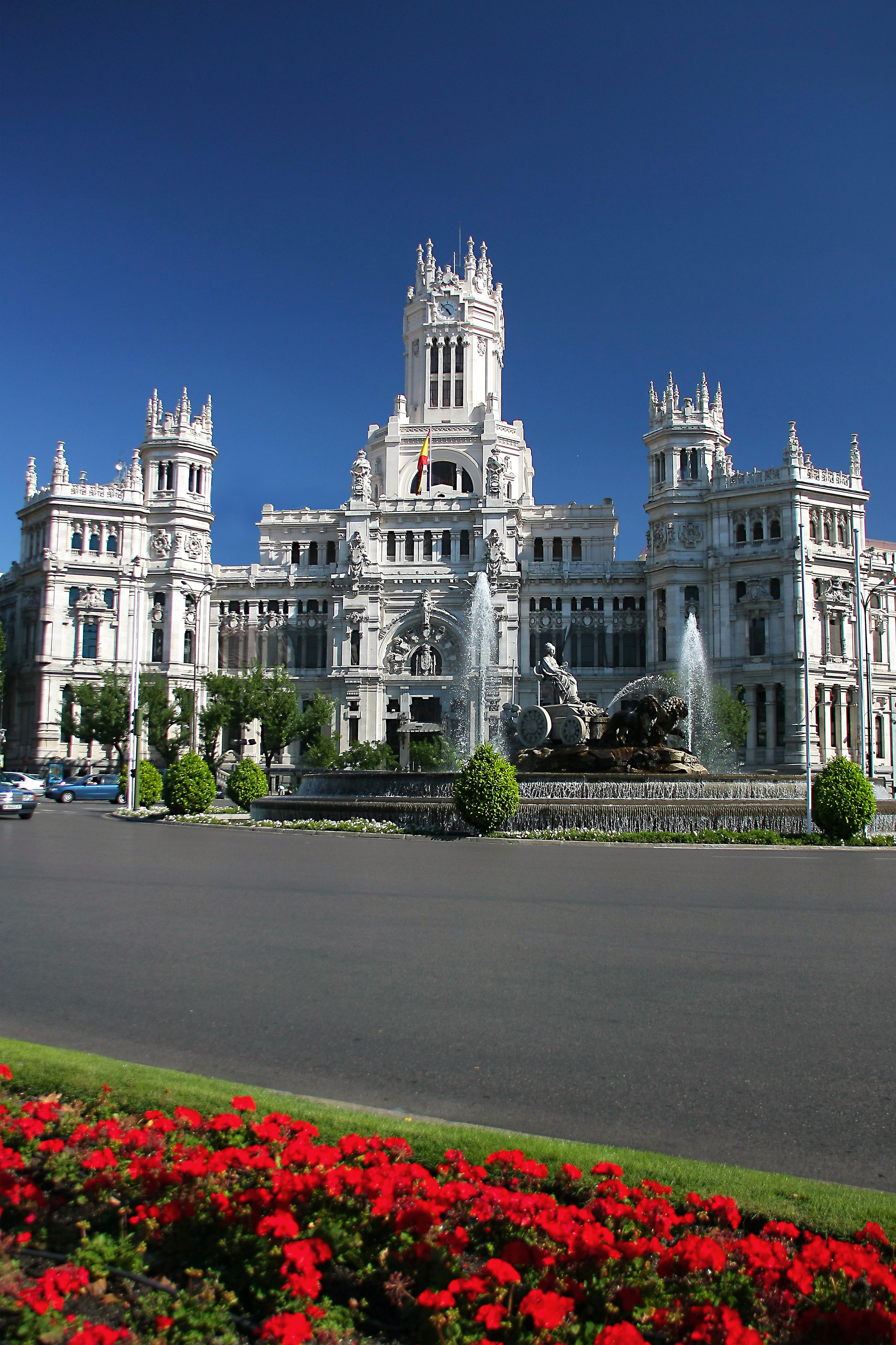 Plaza de Las Cibeles, Madrid, España, 2008.